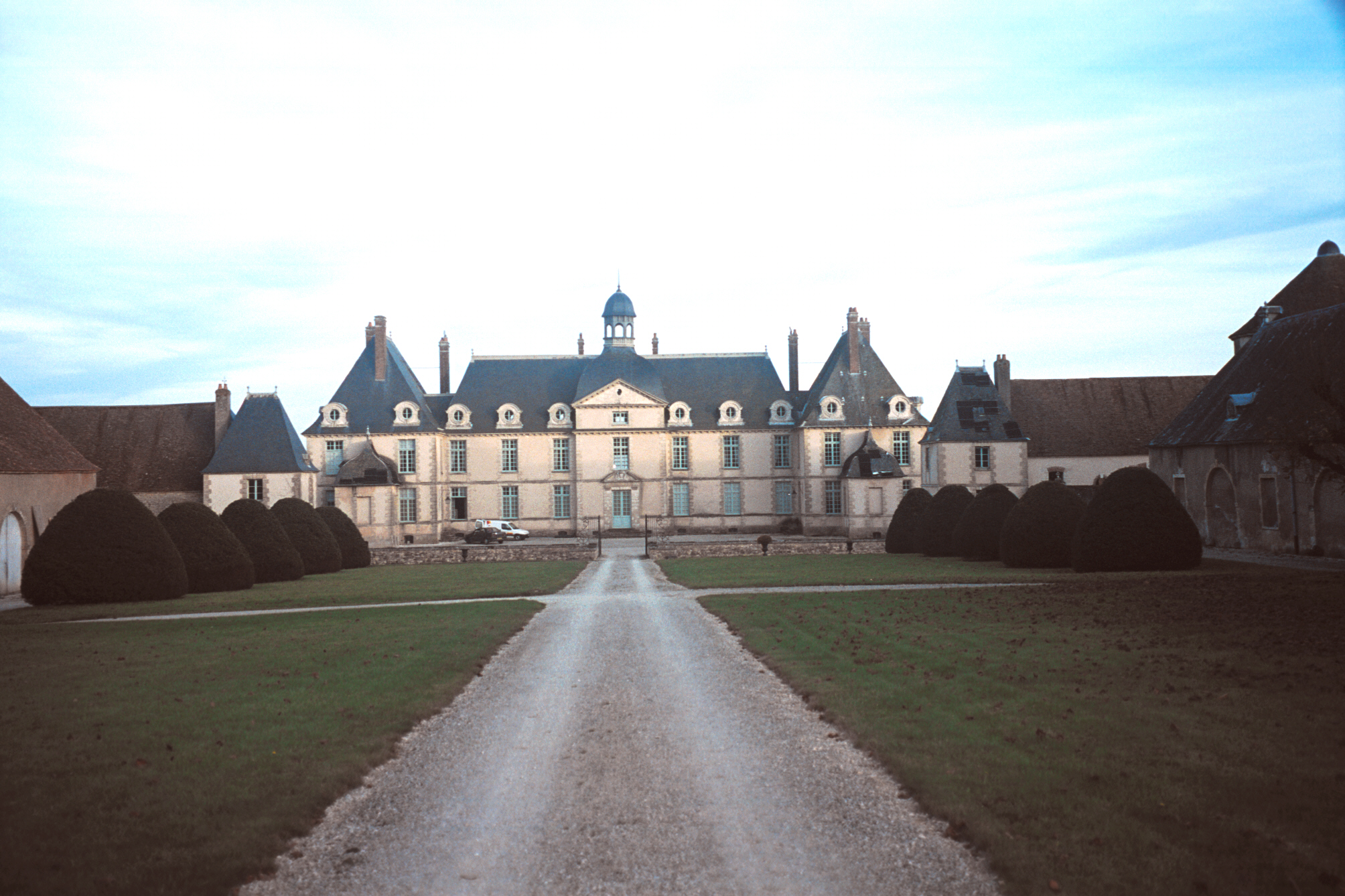 Château de Menou (Nièvre). Vue prise le 31 octobre 2002.